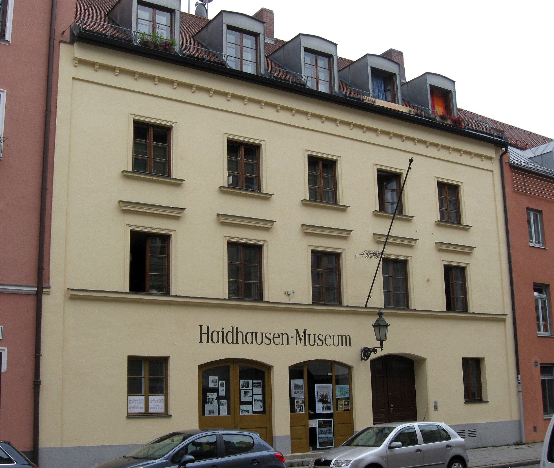 Kirchenstraße 24; Vorstadthaus, klassizistisch, 1862 von Maurermeister Heuberger und Zimmermeister Joh. Sedlmair.; Haidhausen-Museum